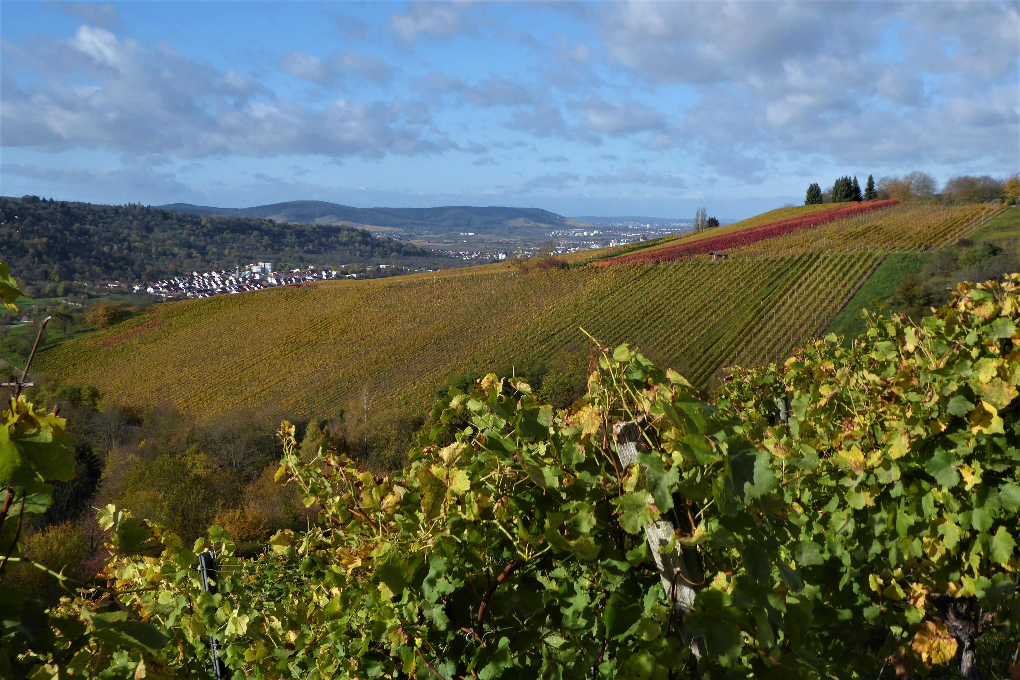 Remshalden Grunbach Weinberg